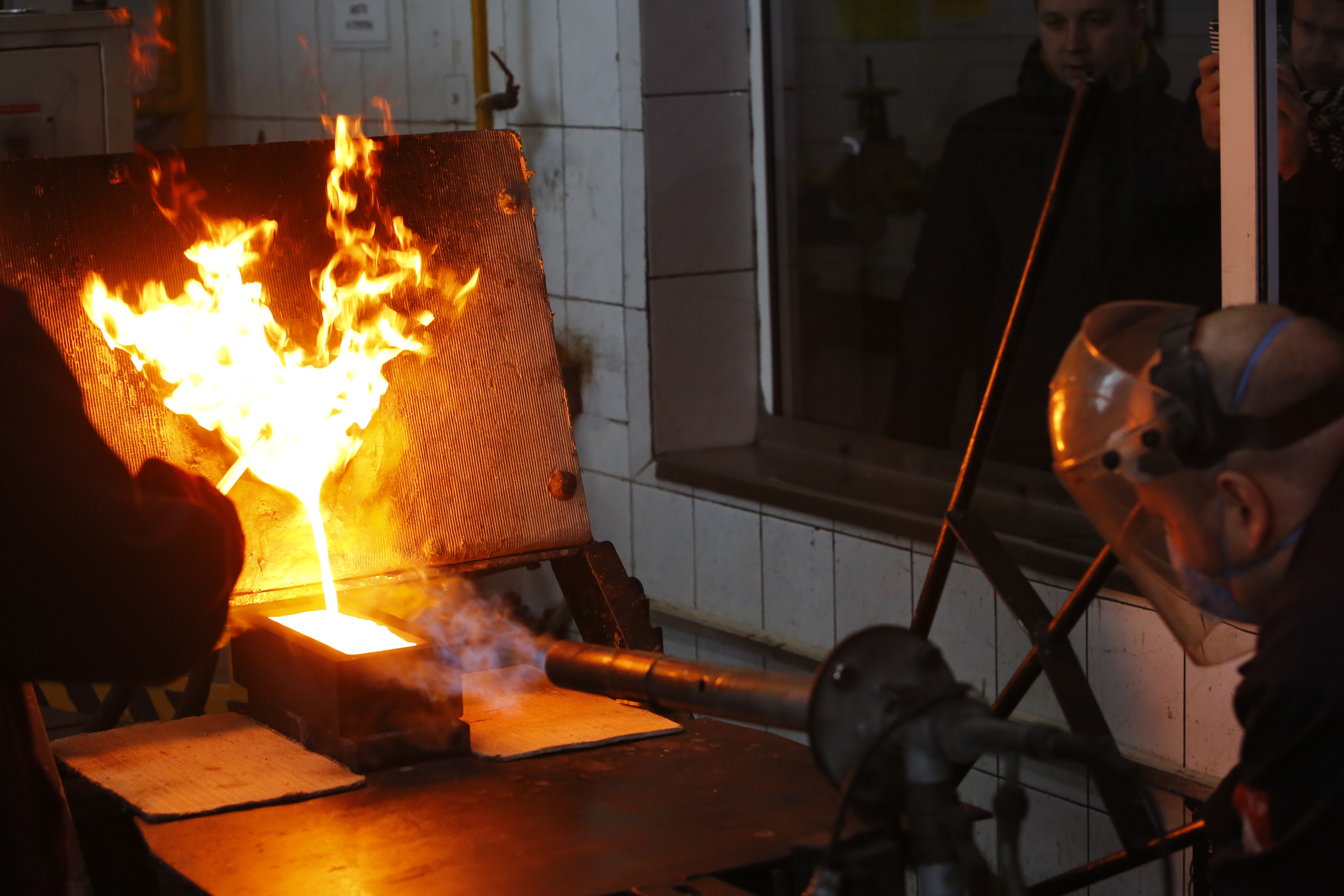 Вики-экспедиция "Медная столица России", день первый. Химико-металлургический цех. Розлив золота, чистота содержания 99,9.